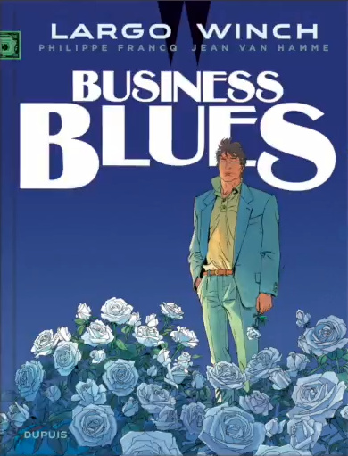 Couverture d'un des albums de Largo Winch (bande dessinée)